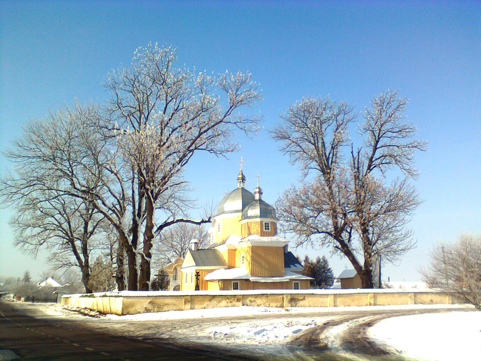 Храм Преображення Господньго. с. Старий Витків